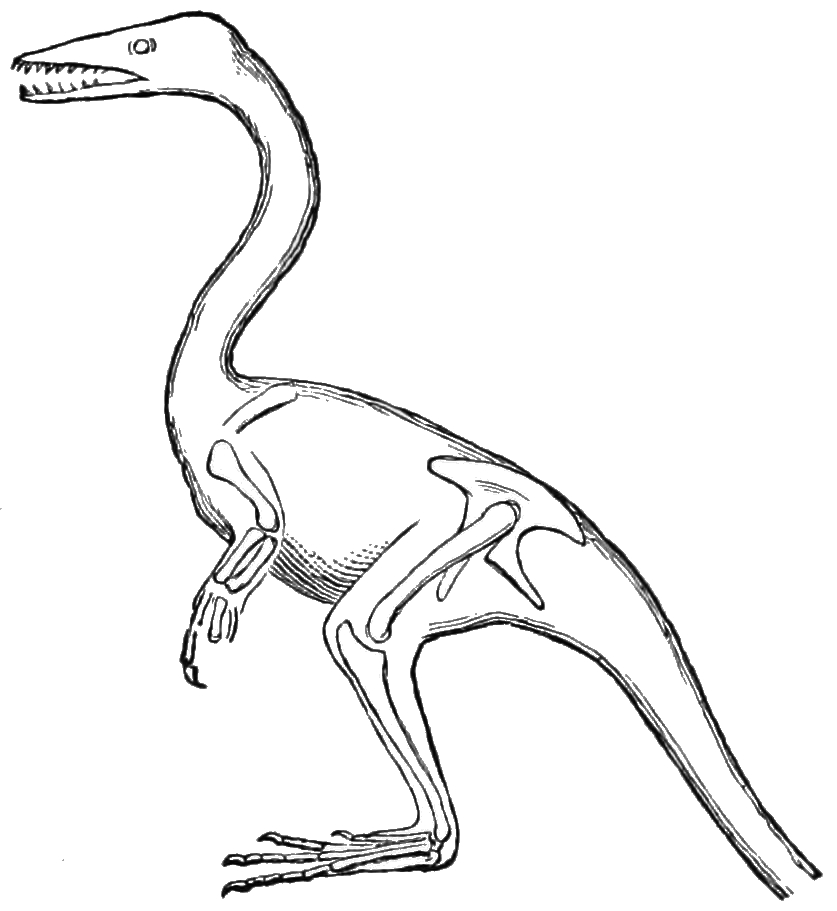 Compsognathus longipes